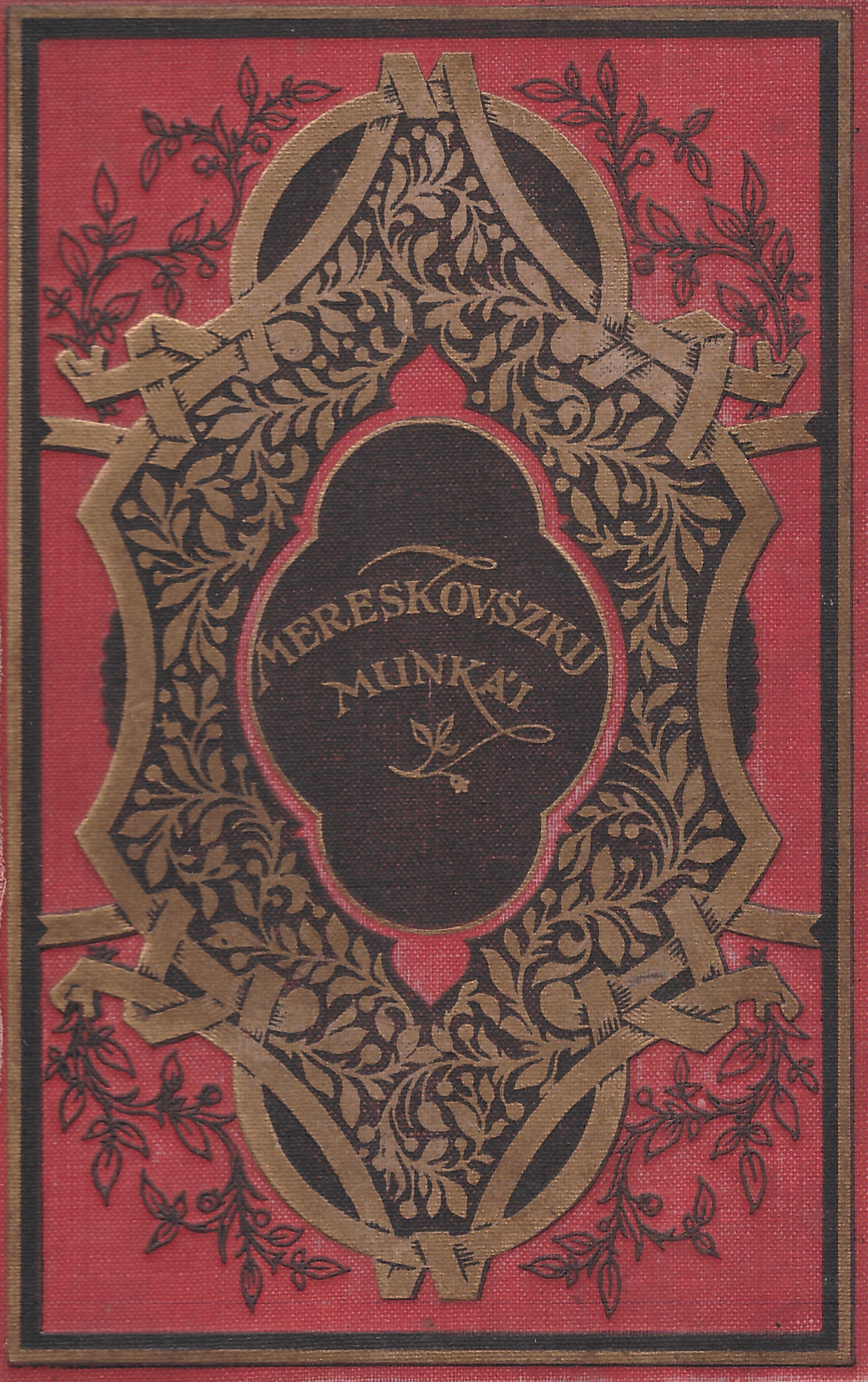 Mereskovszkij műveinek magyar díszkiadása (1920-as évek)